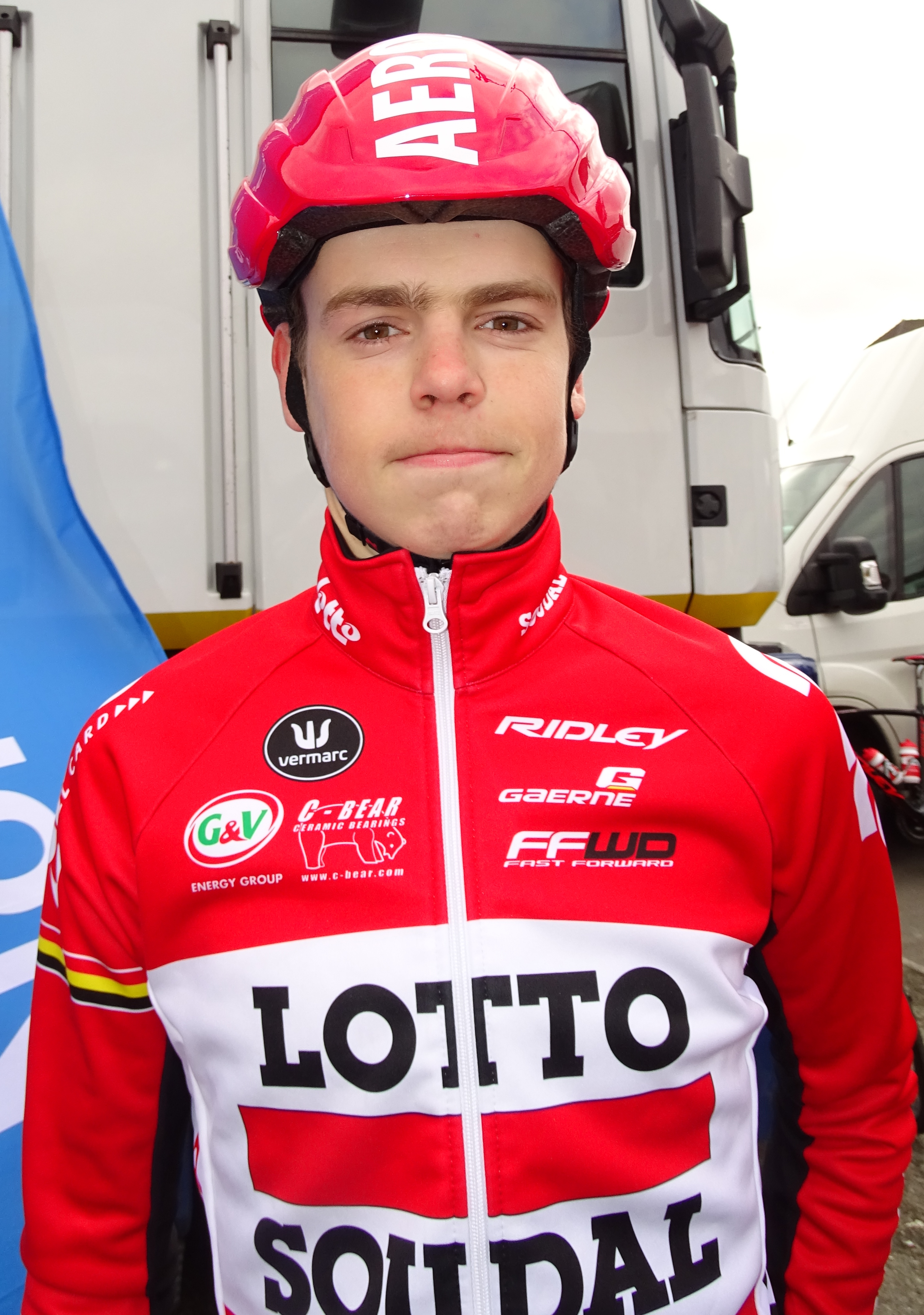 Reportage réalisé le dimanche 6 mars à l'occasion du départ et de l'arrivée du Grand Prix de Lillers-Souvenir Bruno Comini 2016 à Lillers, Pas-de-Calais, Nord-Pas-de-Calais, France.